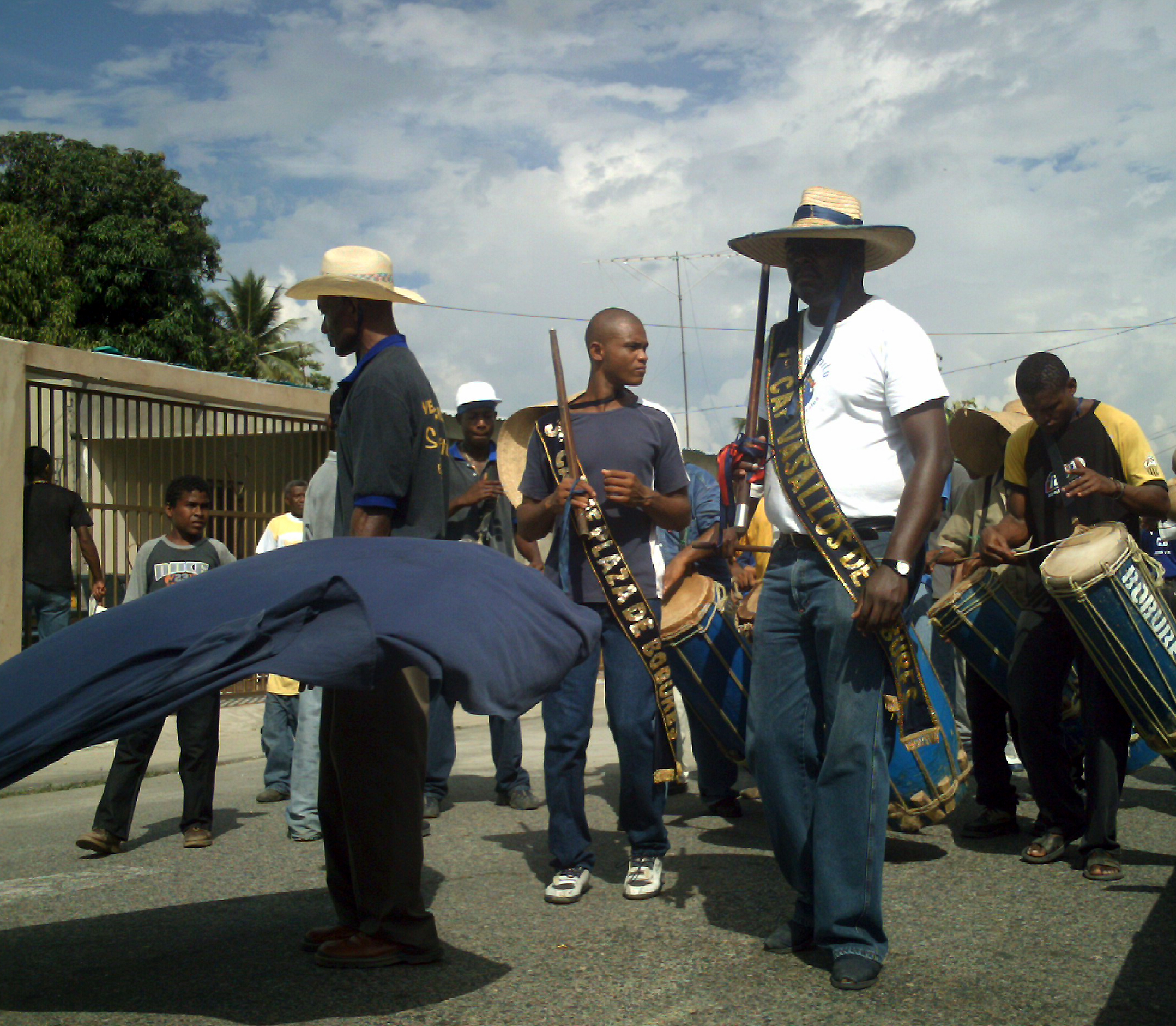 San Benito de Palermo y los Chimbángles. El culto a San Benito de Palermo se realiza en muchas regiones de Venezuela, pero es quizás en el Estado Zulia donde se lleve a cabo con mayor fervor. Probablemente sea en el sur del Lago de Maracaibo donde alcance su máximo esplendor por la multitudinaria participación de la población y la esmerada elaboración del ritual. Tiene su momento culminante los días 27 y 28 de diciembre y finaliza el 6 de enero. San Benito, Patrón de Palermo, también conocido como el Moro, era hijo de negros esclavos manumitidos. Muerto a finales del siglo XVI, su culto se extiende por las comunidades de esclavos negros americanos.